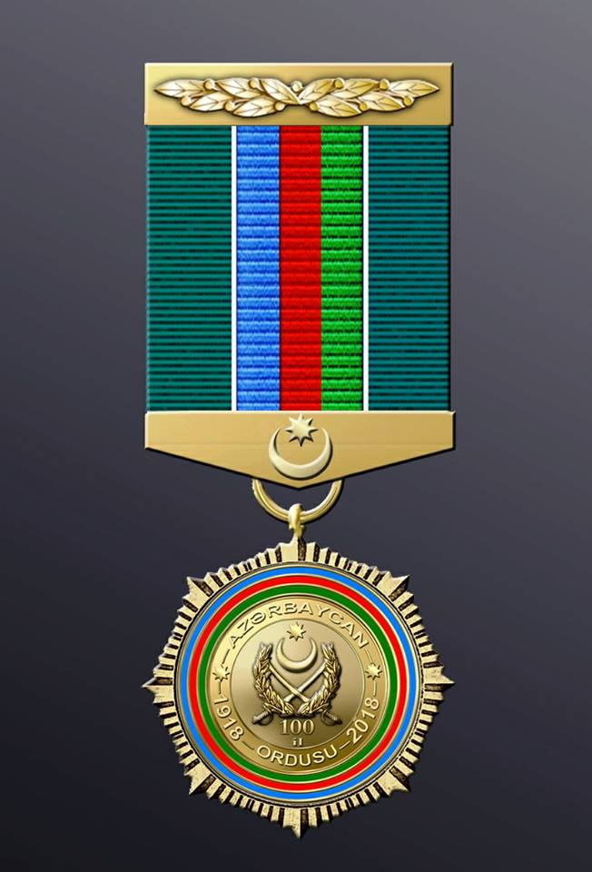 "Azərbaycan Ordusunun 100 illiyi (1918-2018)" yubiley medalı